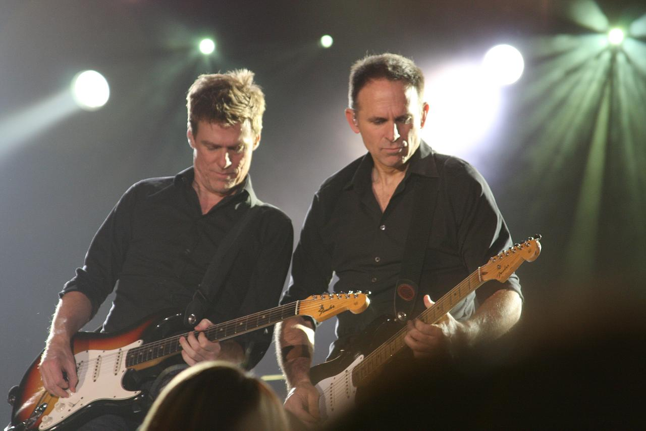 Bryan Adams